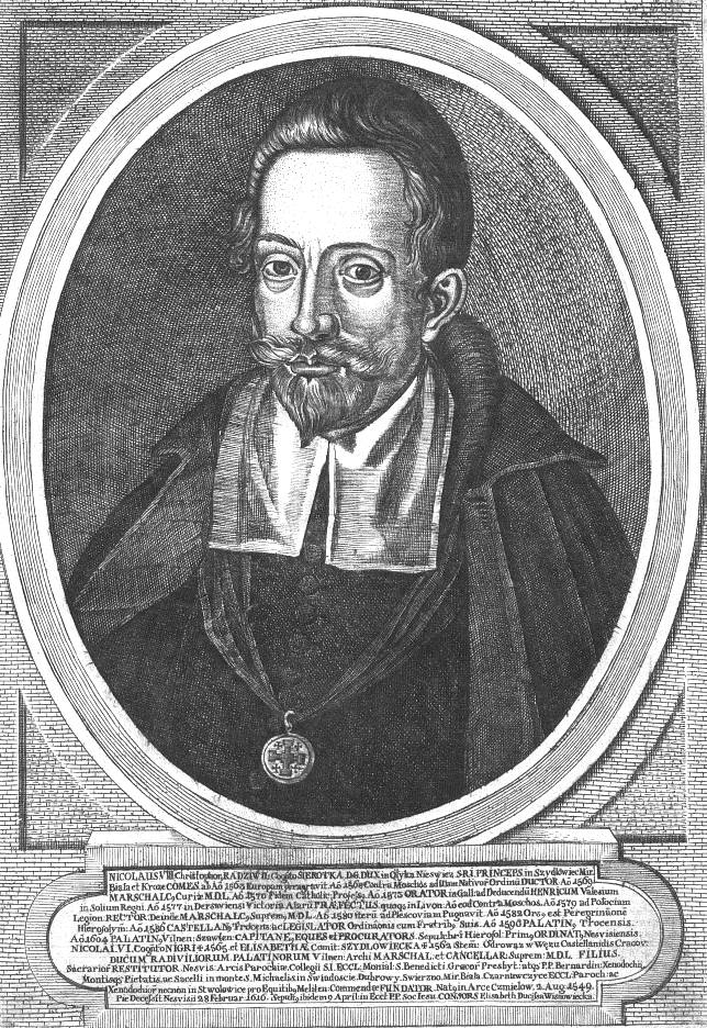 Mikołaj Krzysztof Radziwiłł Sierotka Grand Marshal of Lithuania